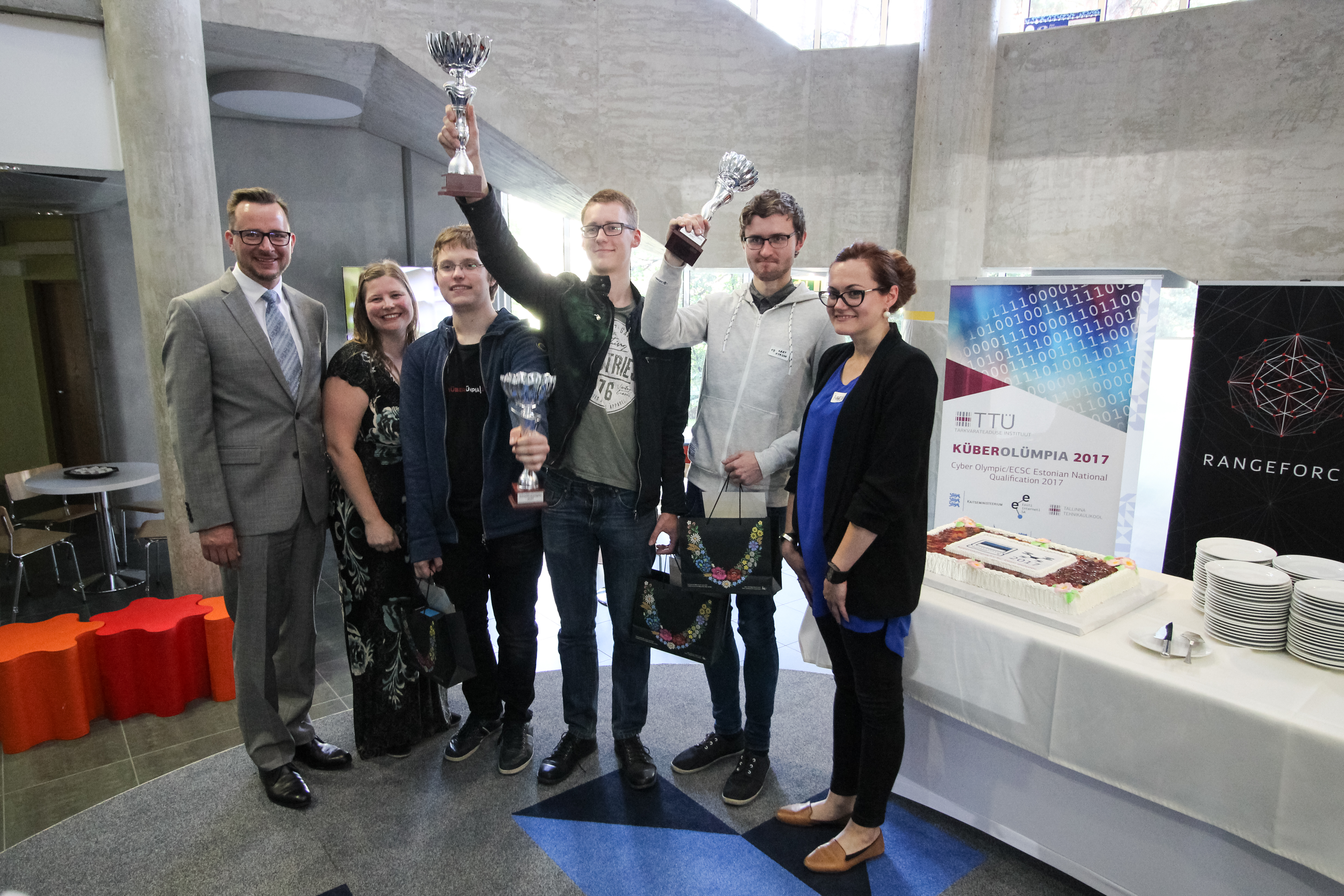 Küberolümpia 2017 võitjad